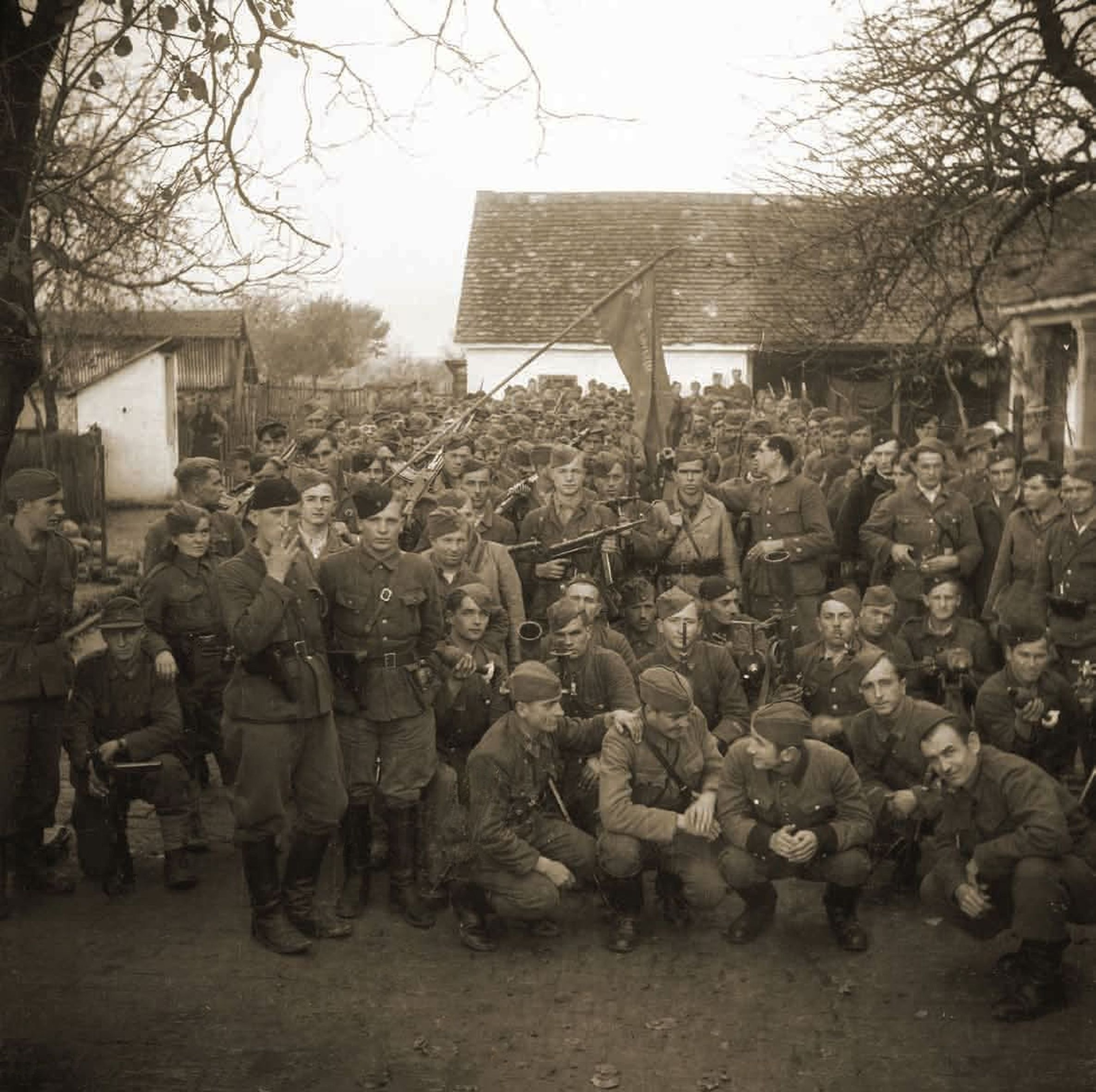 На фотографии изображён так называемый «русский» батальон, сформированный в составе Осиекской ударной бригады Народно-освободительной армии Югославии из граждан СССР. Наименование подразделения не связано с его национальным составом. По установившейся традиции Советский Союз за рубежом называли Россией. В действительности же «русские» партизанские формирования состояли из представителей многочисленных национальностей Советского Союза. Фотография сделана осенью 1944 года в Славонии. Опубликована в 1952 году в альбоме «Slavonija u borbi : 1941-1945».